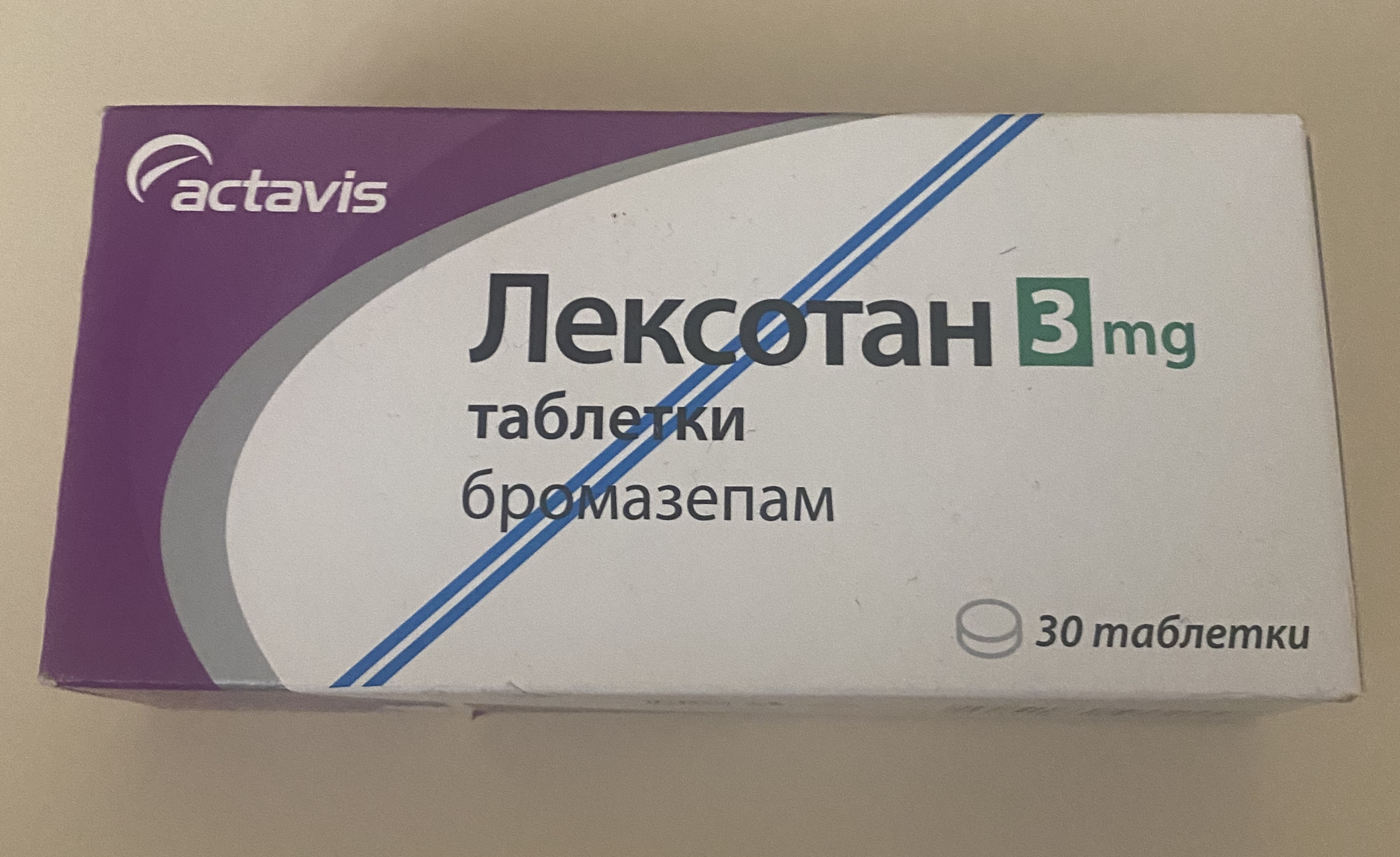 Лексотан